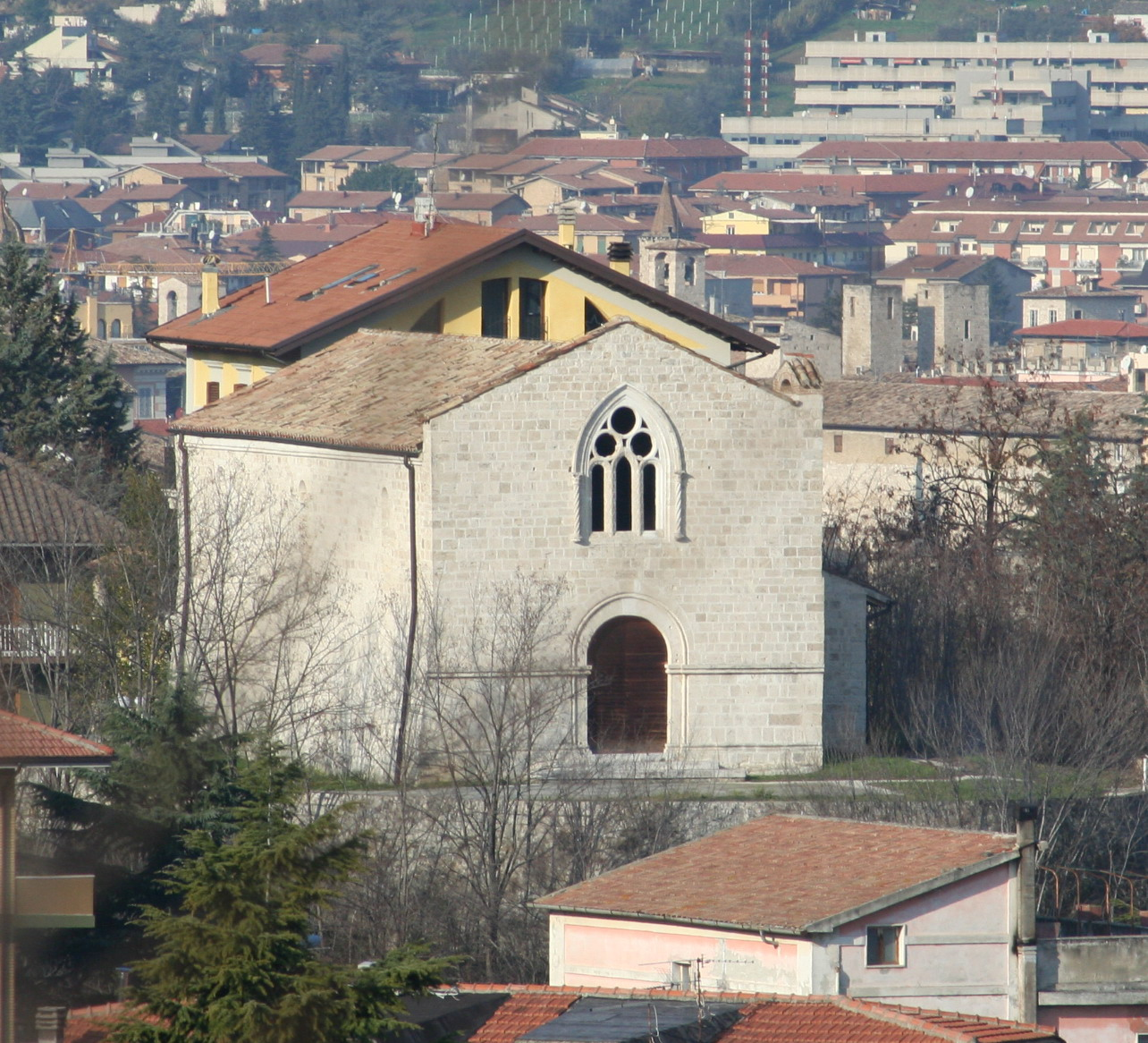 Chiesa di San Salvatore di Sotto ad Ascoli Piceno.